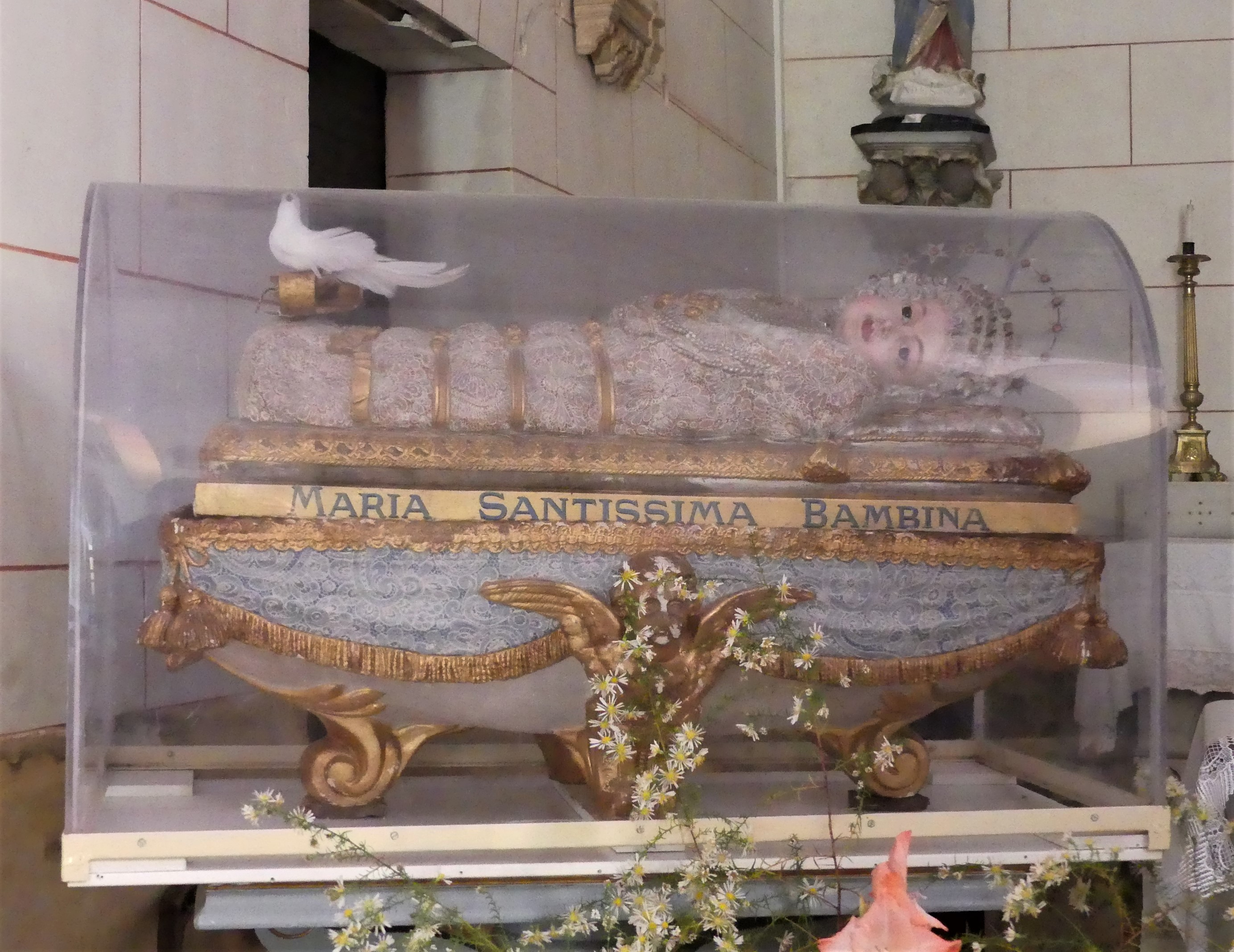 La statue de Maria Santissima Bambina (la Vierge-enfant), église de Laveyssière, Dordogne, France.